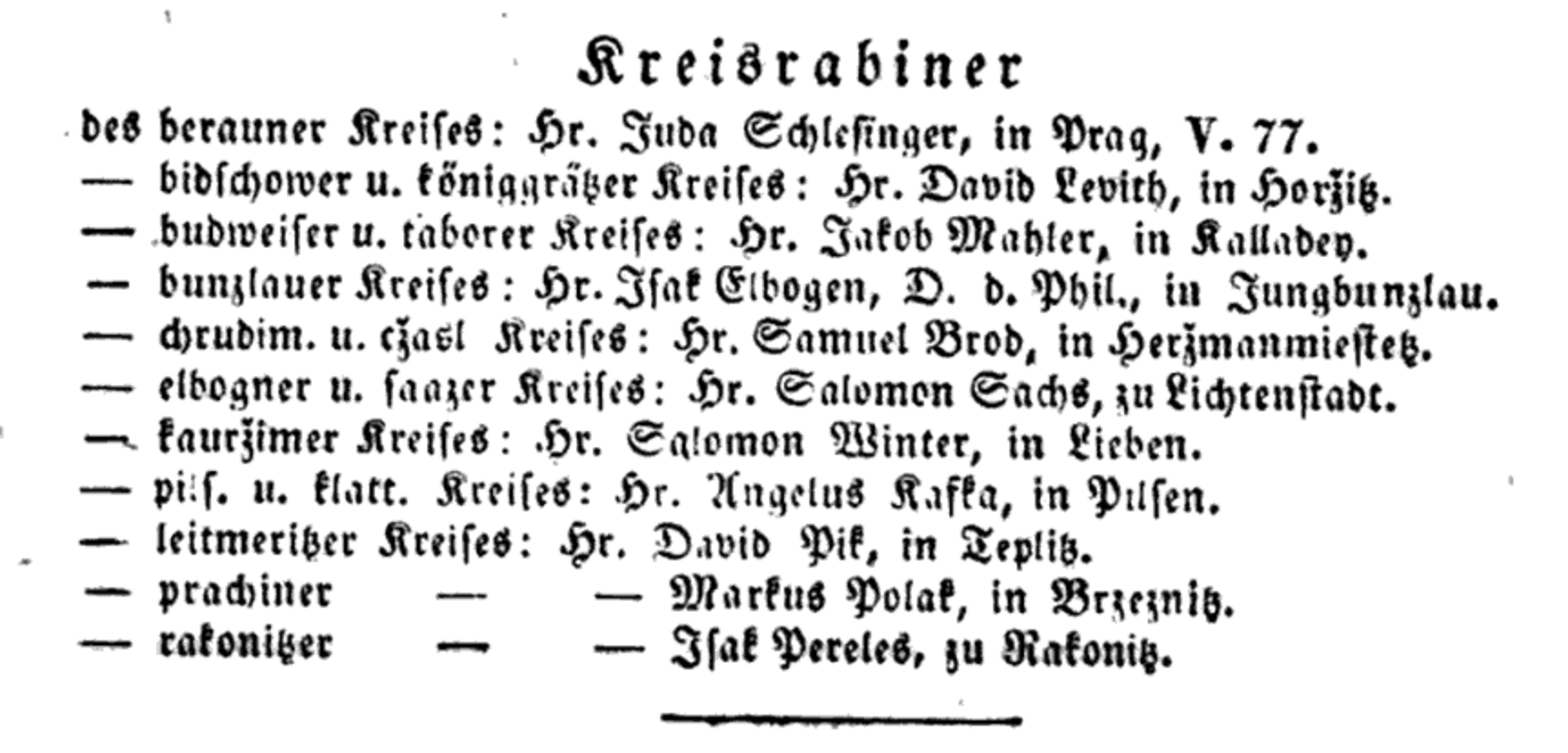 Seznam krajských rabínů působících v Čechách k roku 1846, in Handbuch des Königreiches Böhmen für das Jahr 1846. Rabín Elbogen třetí shora.